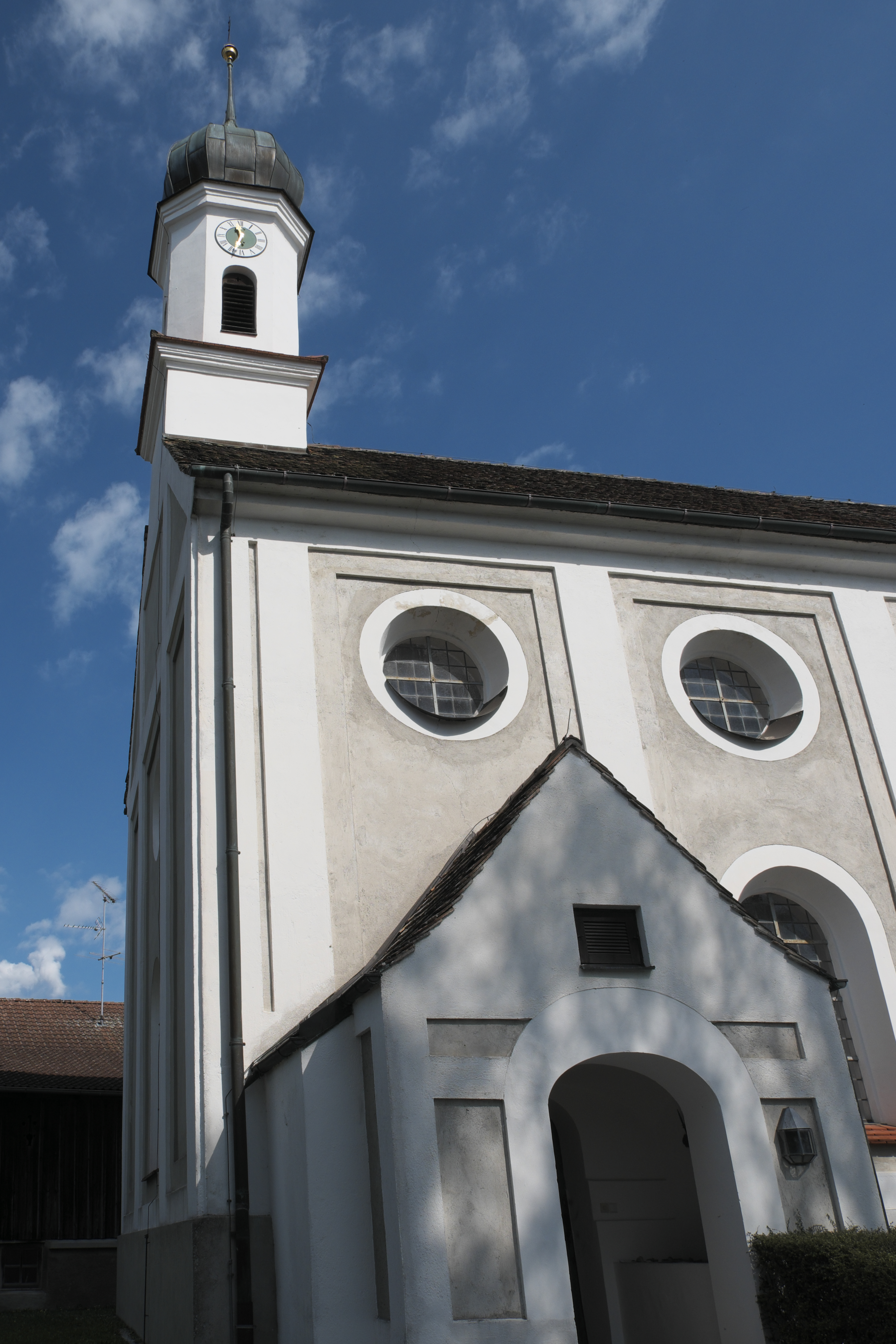 Katholische Pfarrkirche St. Margaretha in Magnetsried (Seeshaupt) im Landkreis Weilheim-Schongau (Bayern/Deutschland)